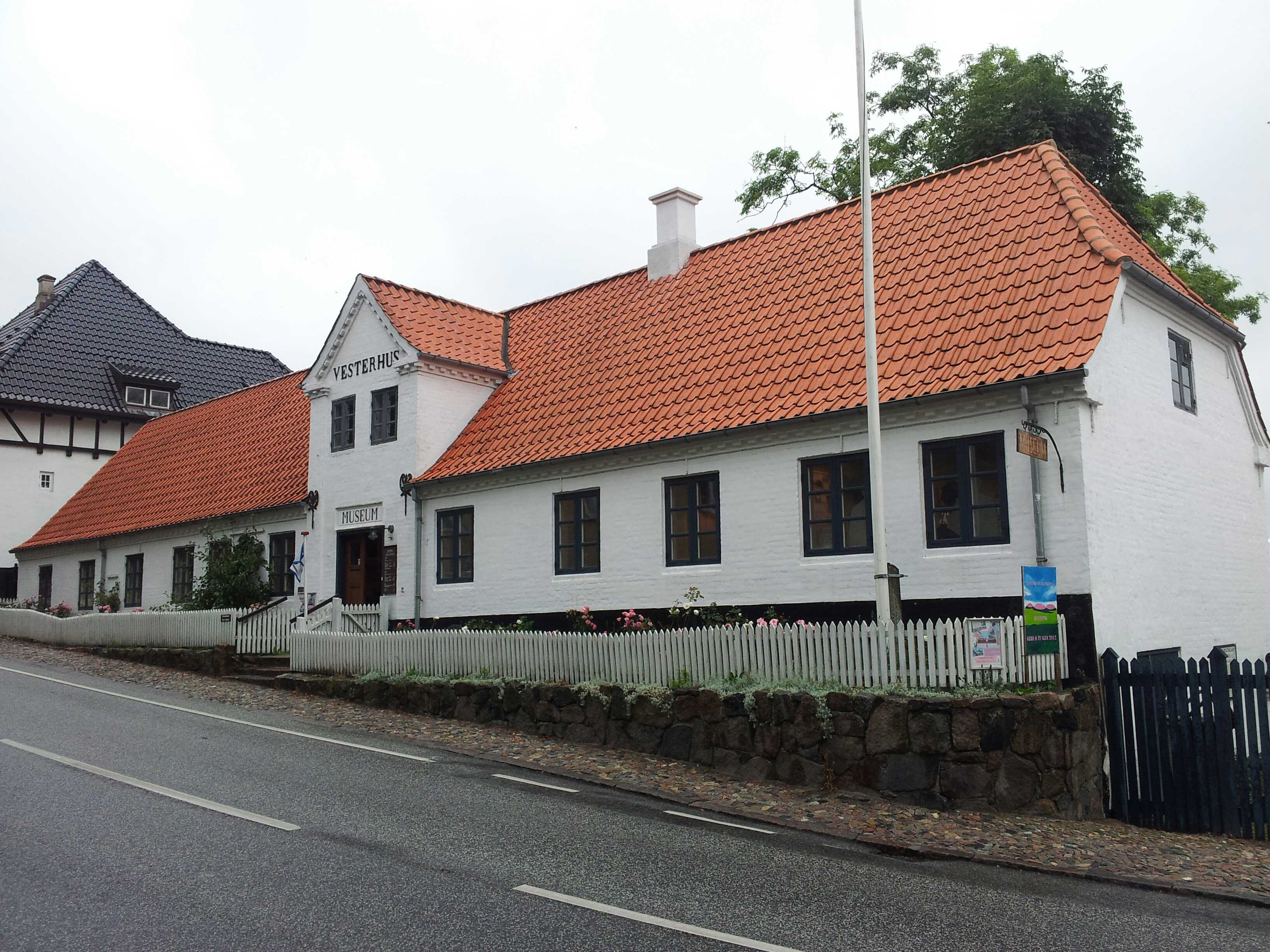 Vesterhus, Lemvig Museum This photo was uploaded with Wiki Loves Monuments mobile 1.2.1 (Android).